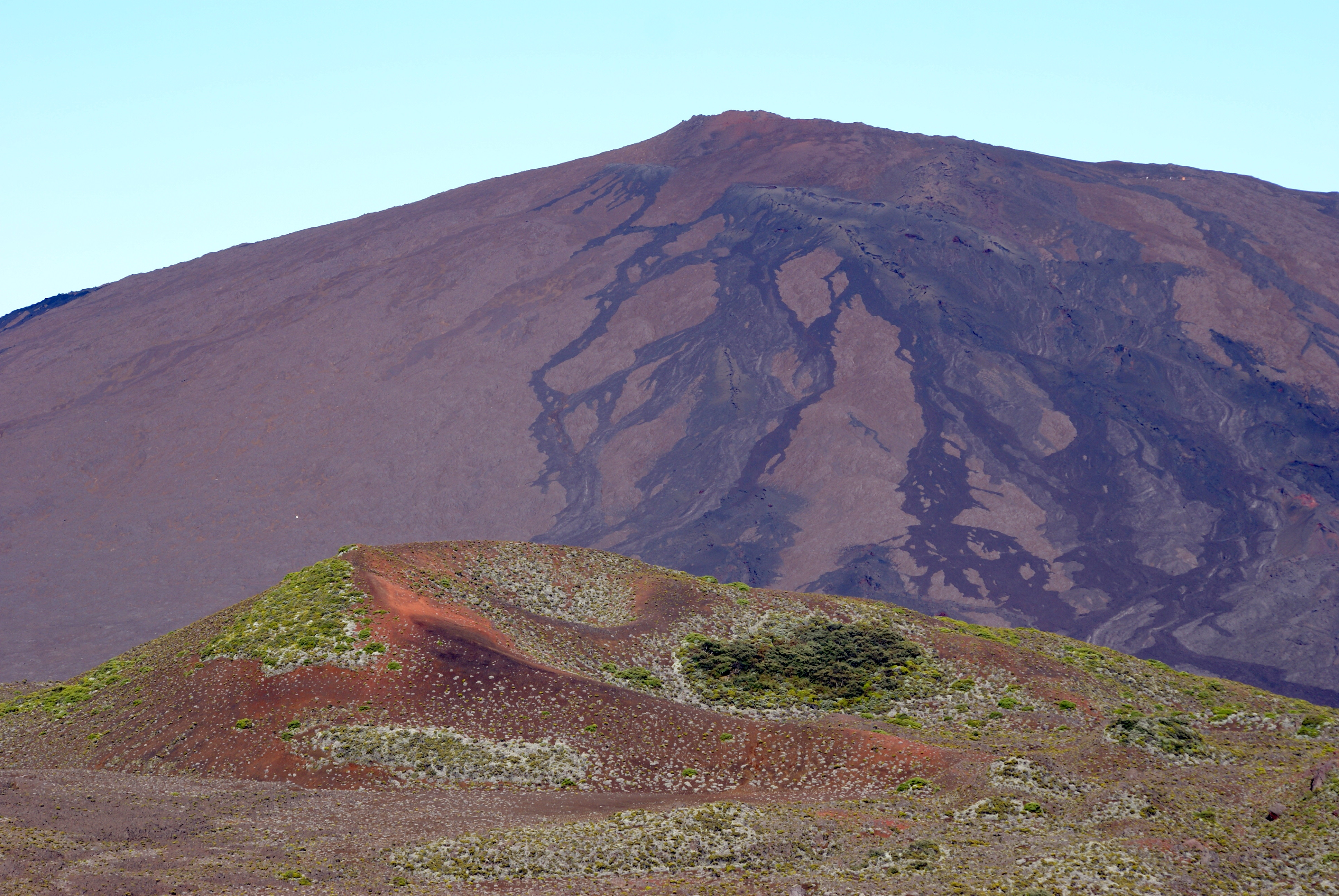 Piton de la Fournaise et piton Rouge vus depuis le Morne Langevin